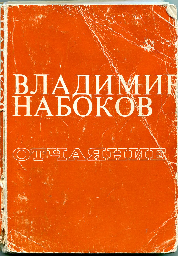 Обложка романа В. Набокова "Отчаяние" издательство Ardis, Ann Arbor, 1978.